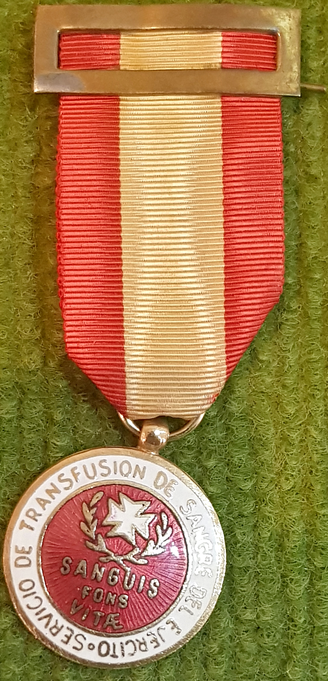 Blutspenderabzeichen der spanischen Armee. Verleihungen erfolgten 1955-89.